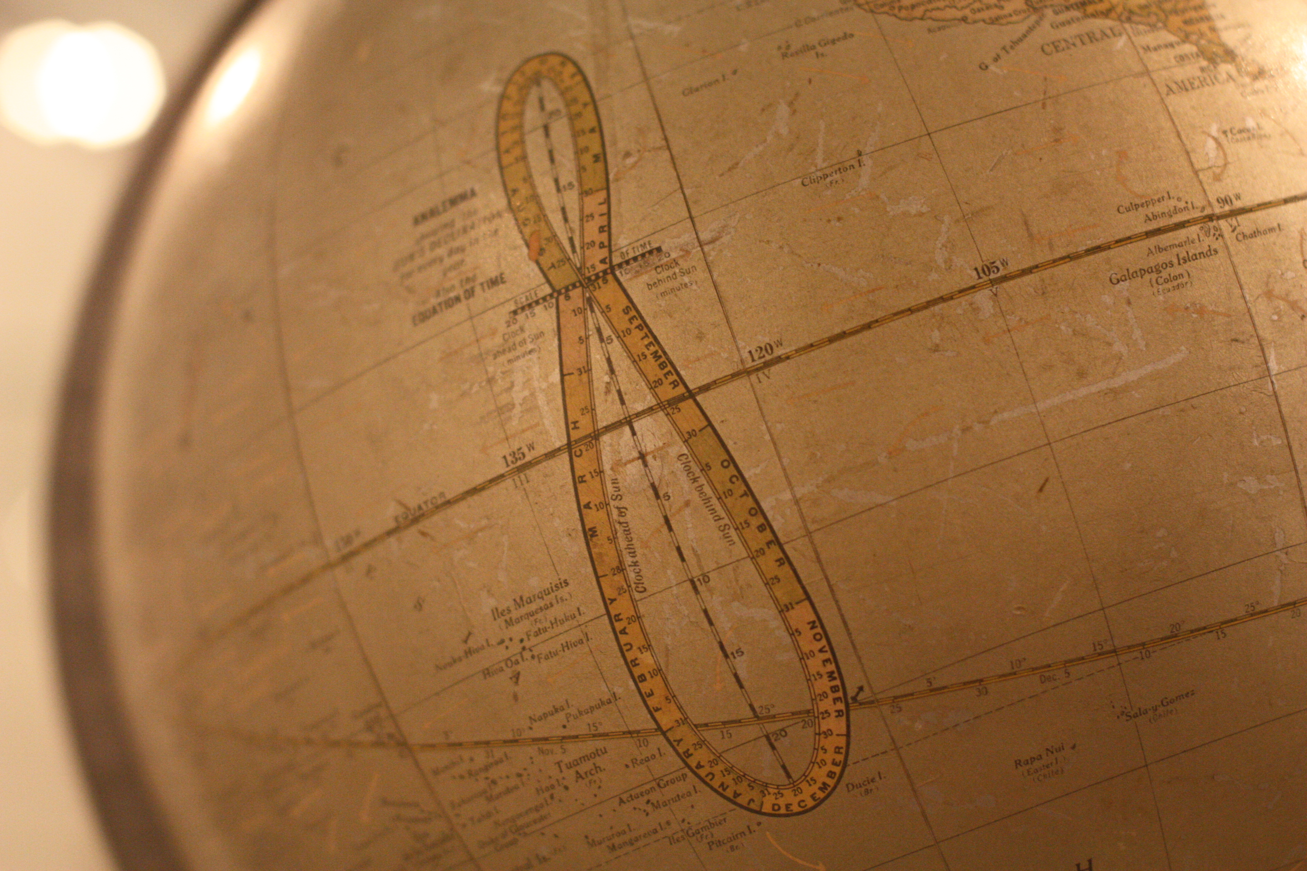 Globenmuseum, Wien, 2009